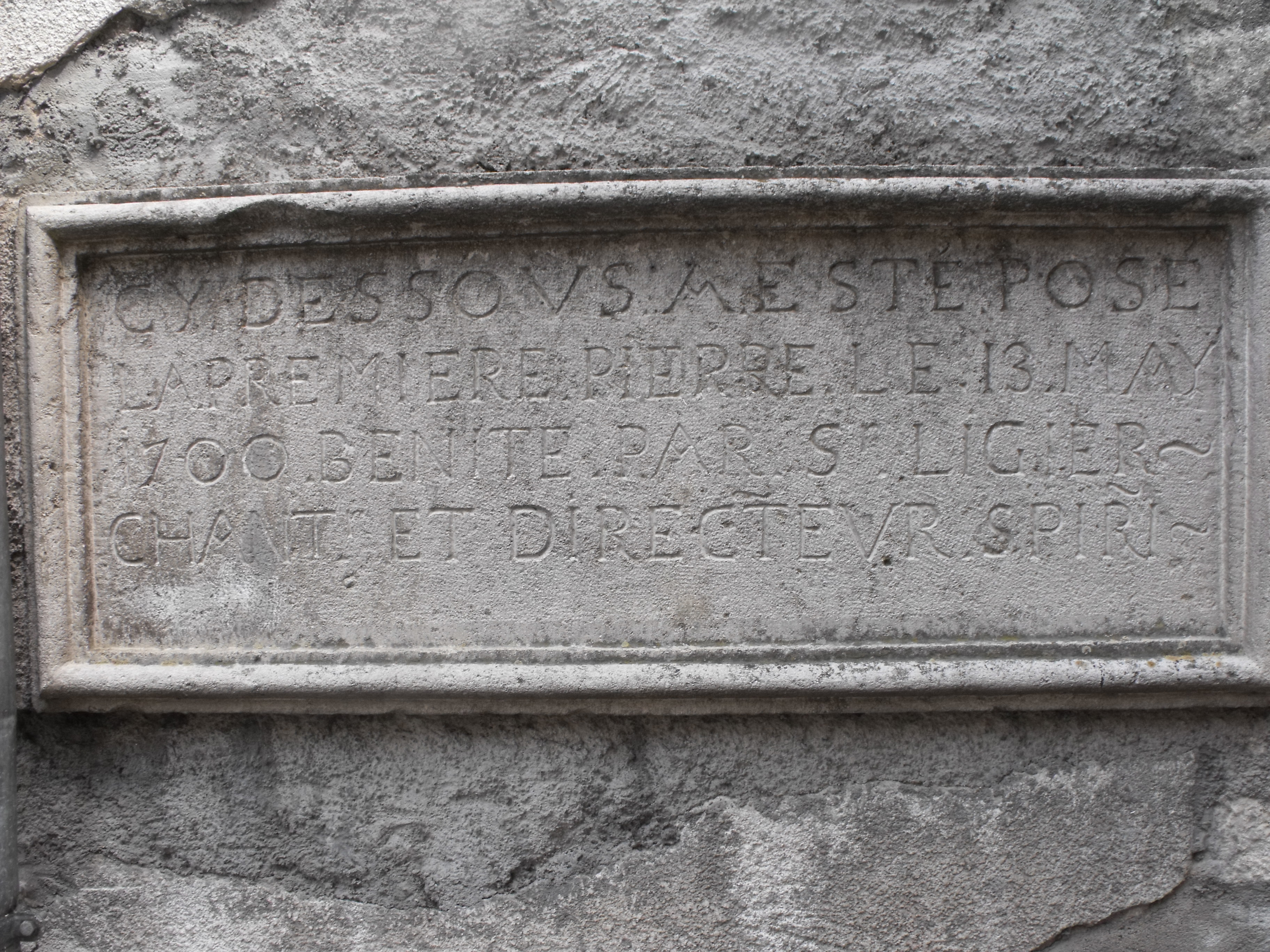 Couvent des ursulines, Saint-Hyppolite, Doubs, France